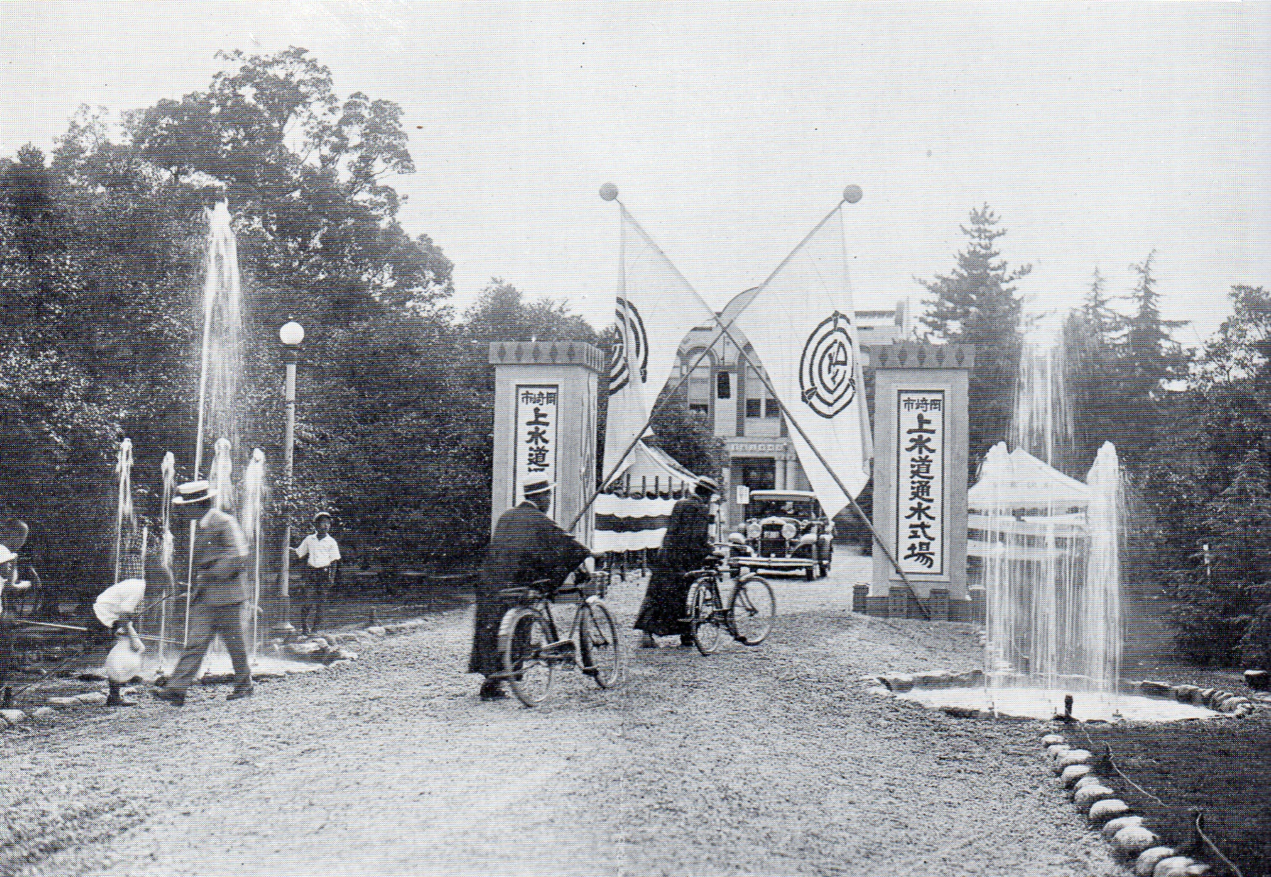 岡崎市上水道通水式（1933年7月19日）